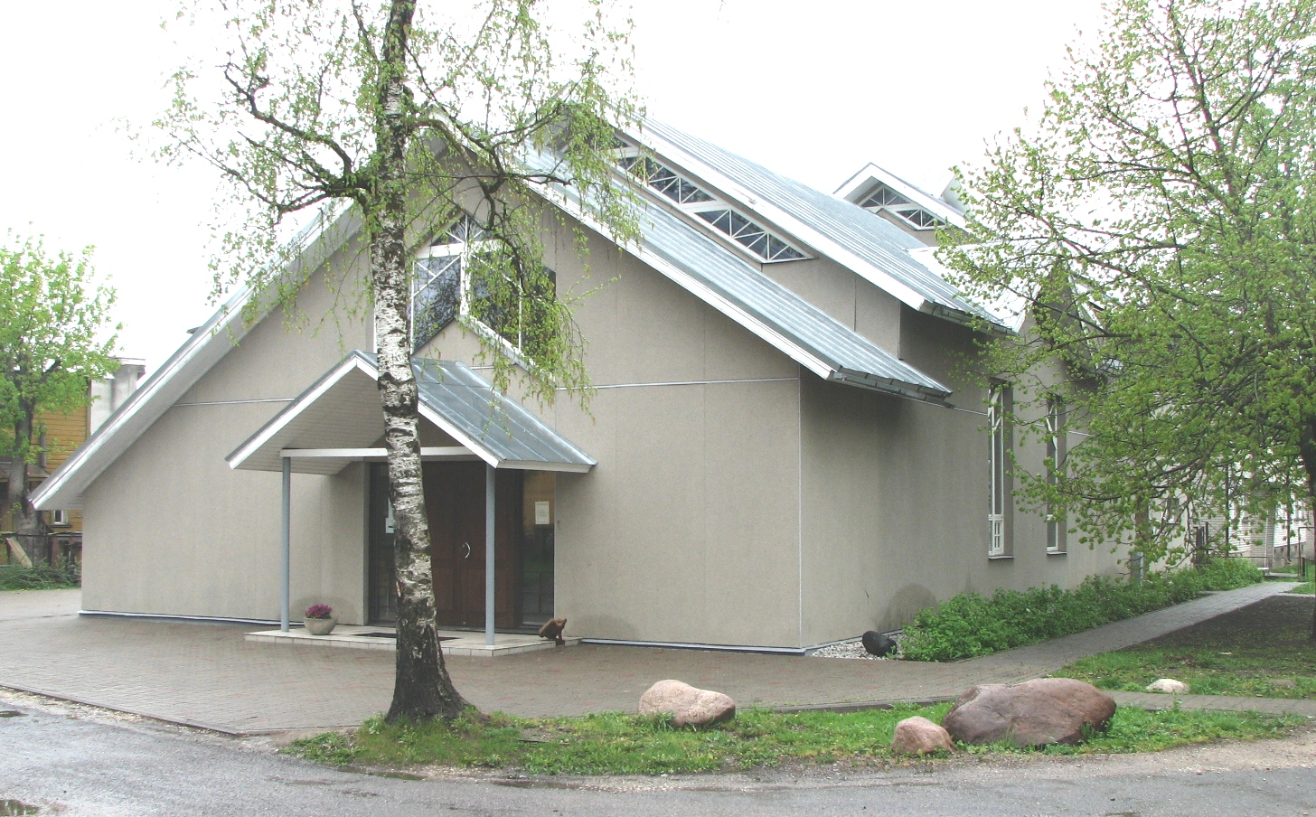 Adventkirik Haapsalus asub aadressil Endla 4